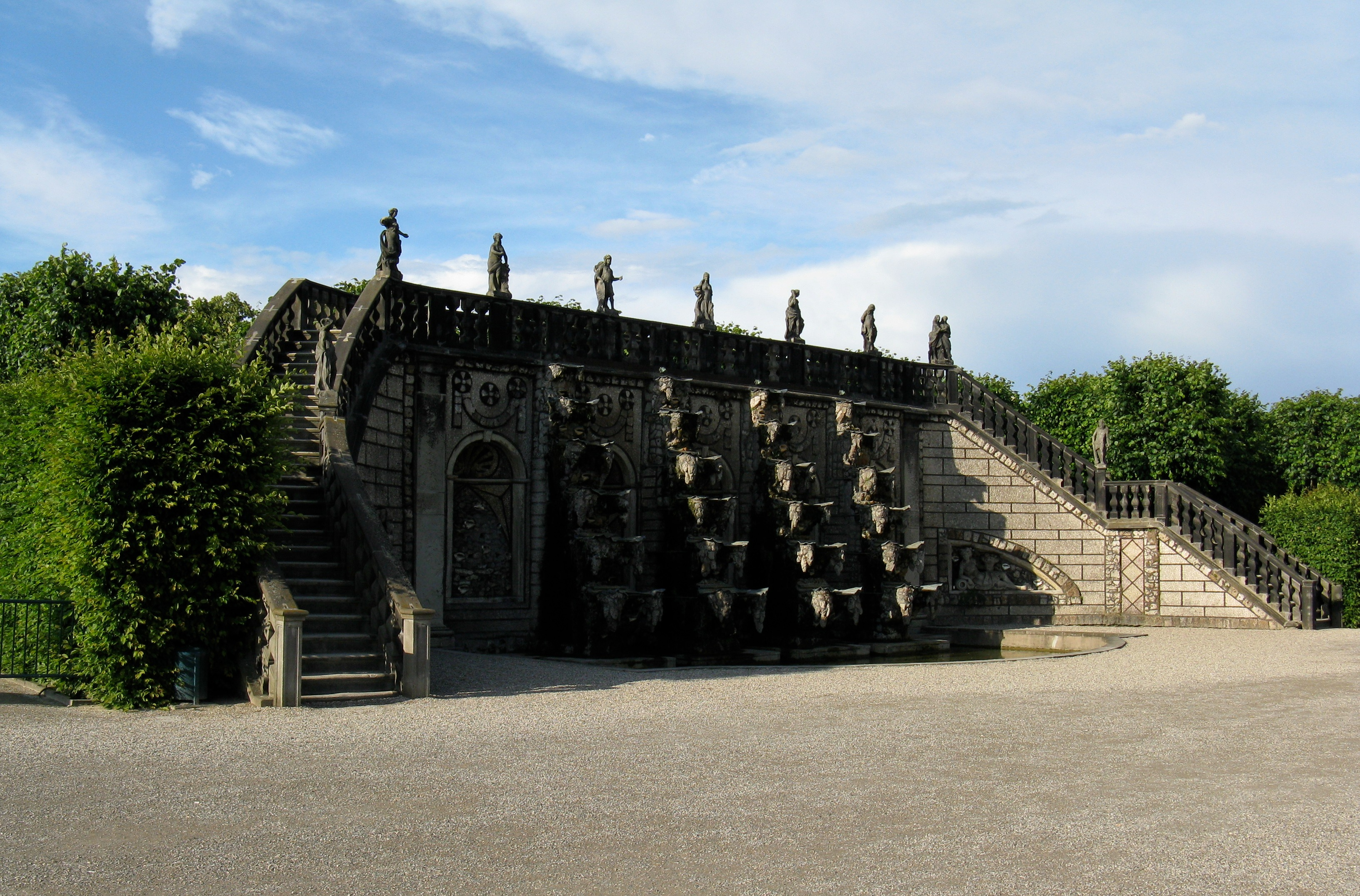 Großer Garten in Hannover-Herrenhausen: Kaskade